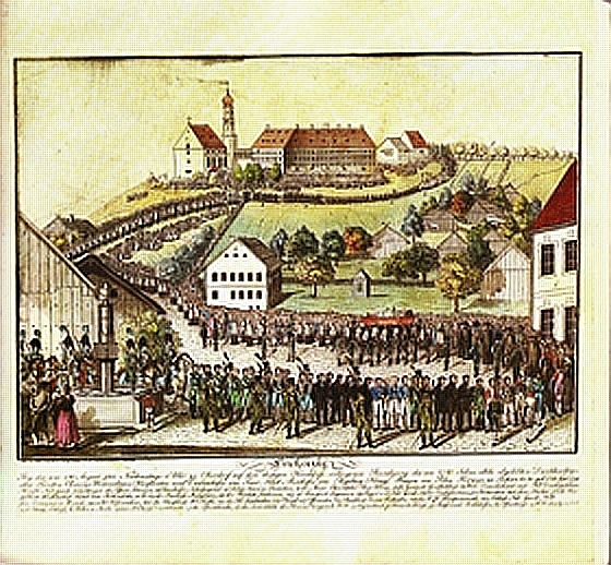 Leichenzug für Fürstbischof Clemens Wenzeslaus (* 28. September 1739; † 27. Juli 1812) vom Marktplatz auf den Schlossberg von Marktoberdorf, wo er in einer Grabkapelle an der Chorseite der Pfarrkirche St. Martin, neben dem Kurfürstlichen Sommerschloss, beigesetzt ist.